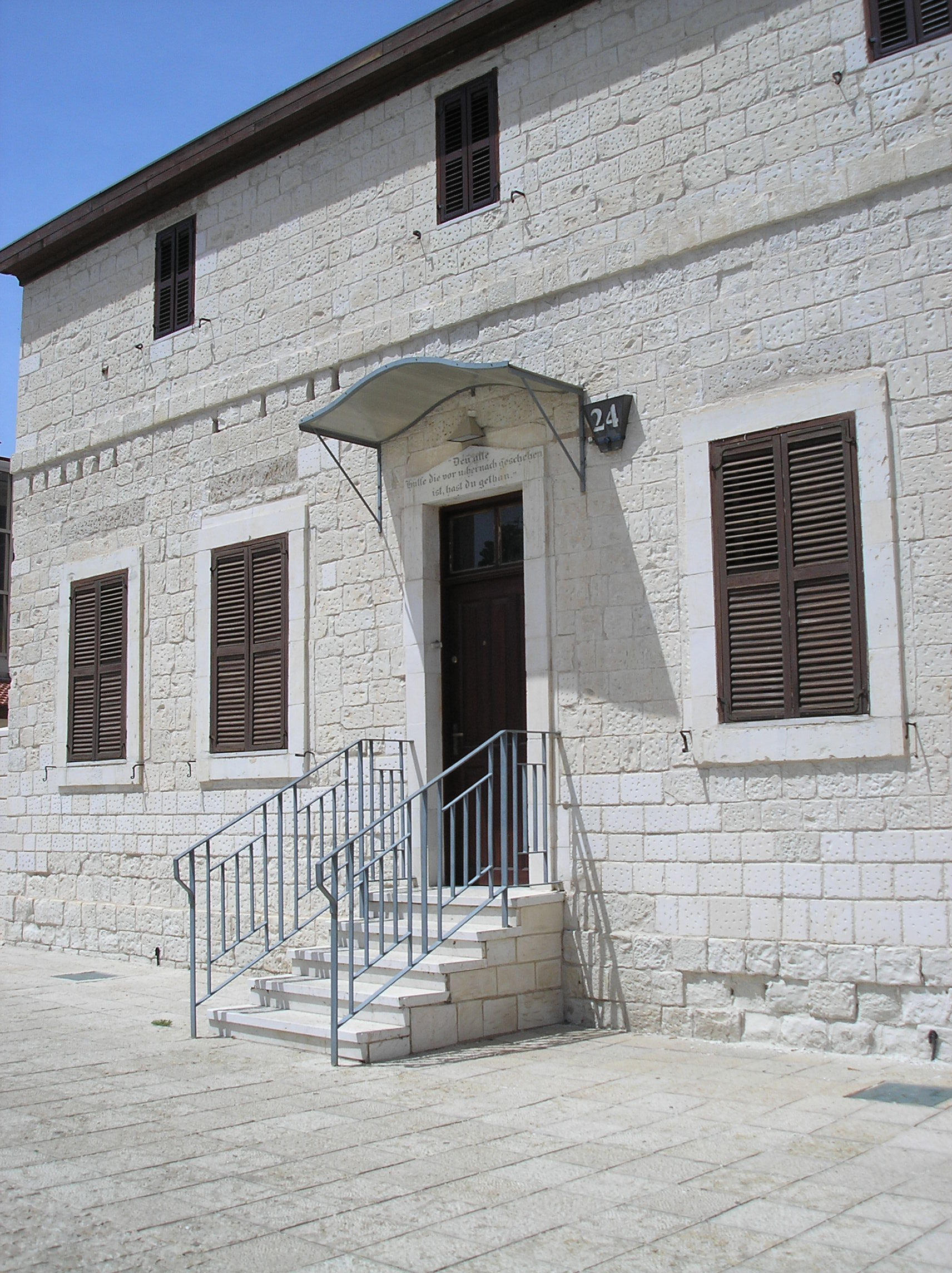 The German Colony in Haifa המושבה הגרמנית בחיפה